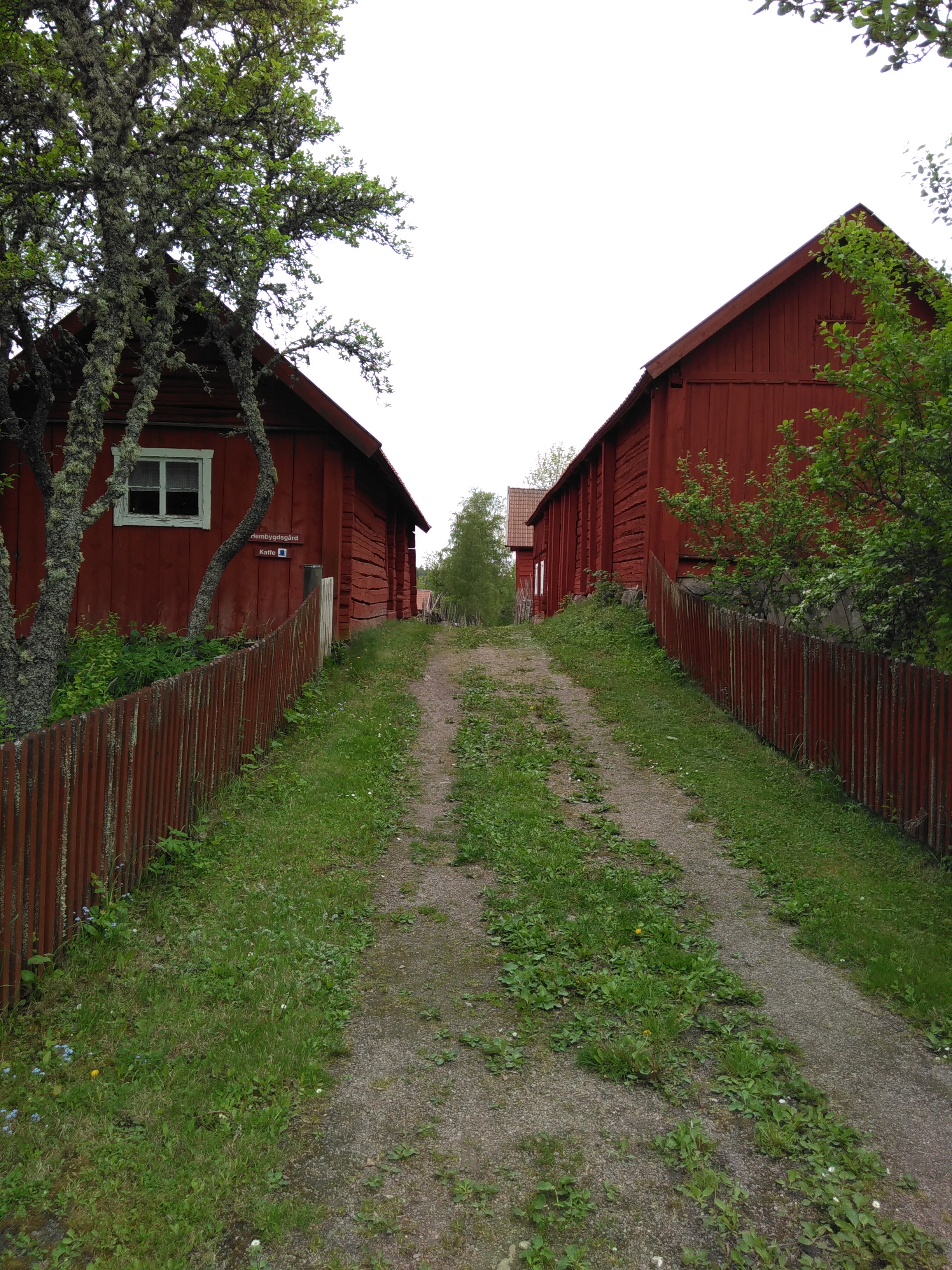 Ekeby by, den raka bygatan genom byn